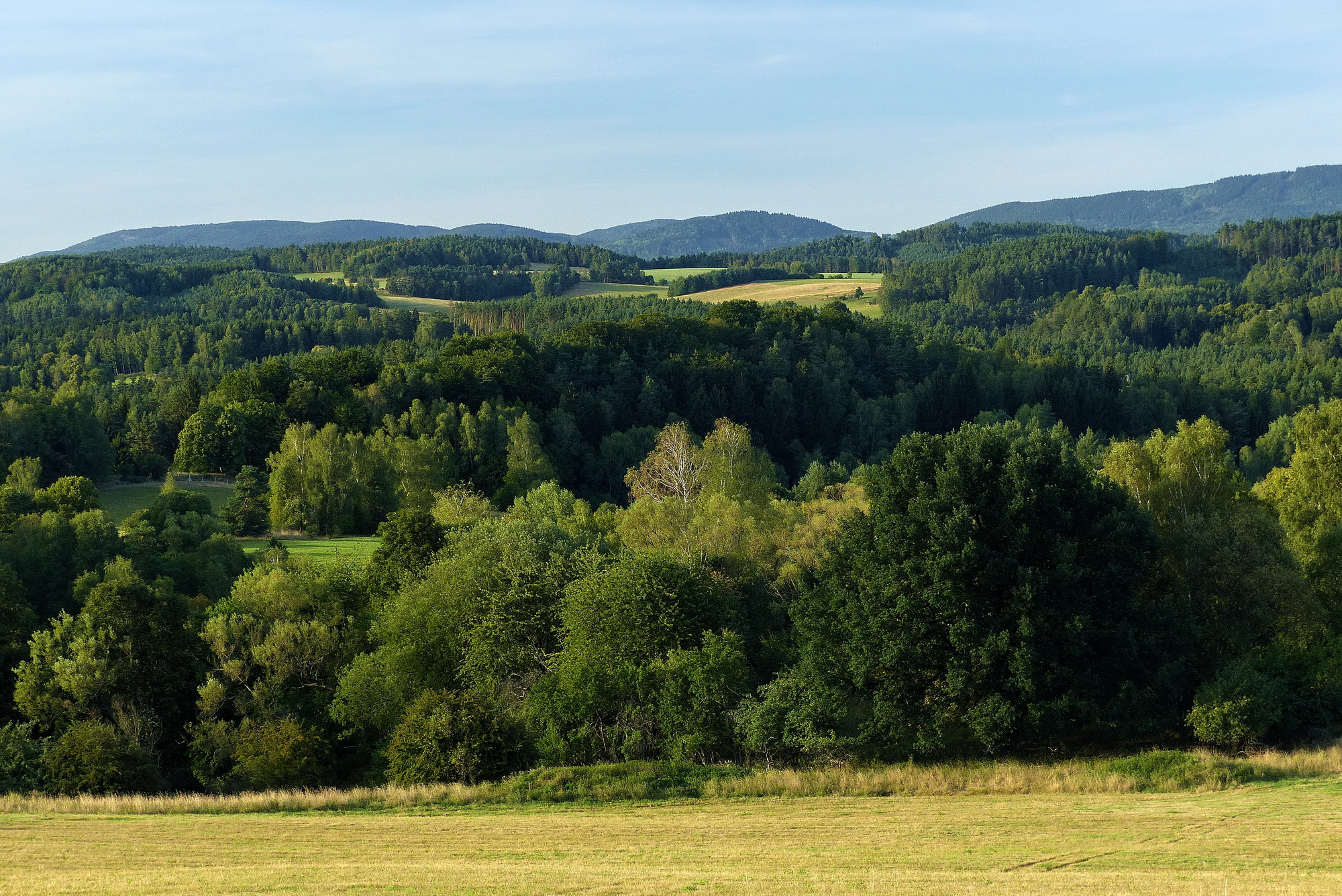 Bývalá obec Křída a Čertova stěna ze Zourovského vrchu, vzadu Kotelská vrchovina a Kryštofovy hřbety